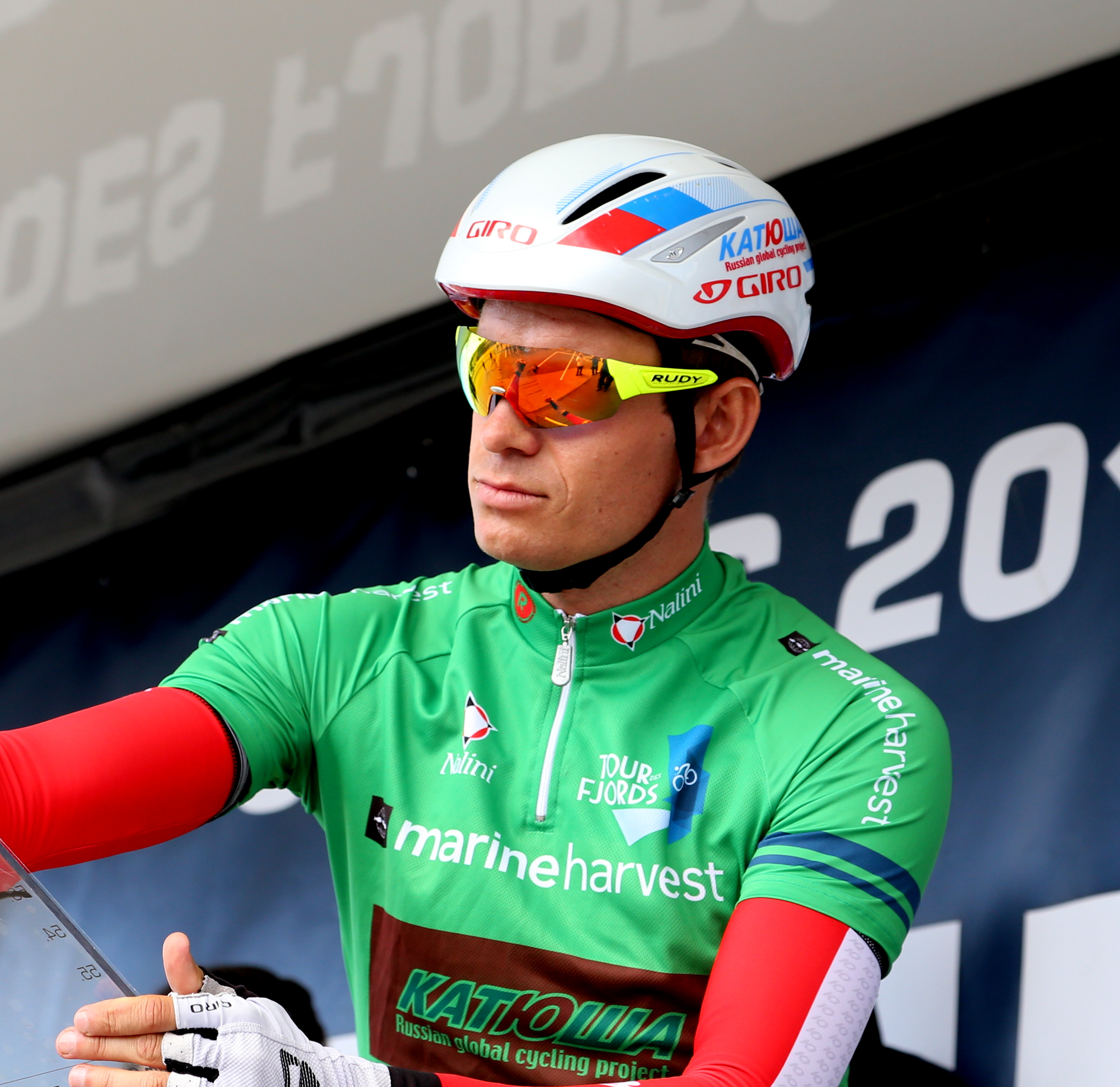 Alexander Kristoff under tour des Fjords 2014